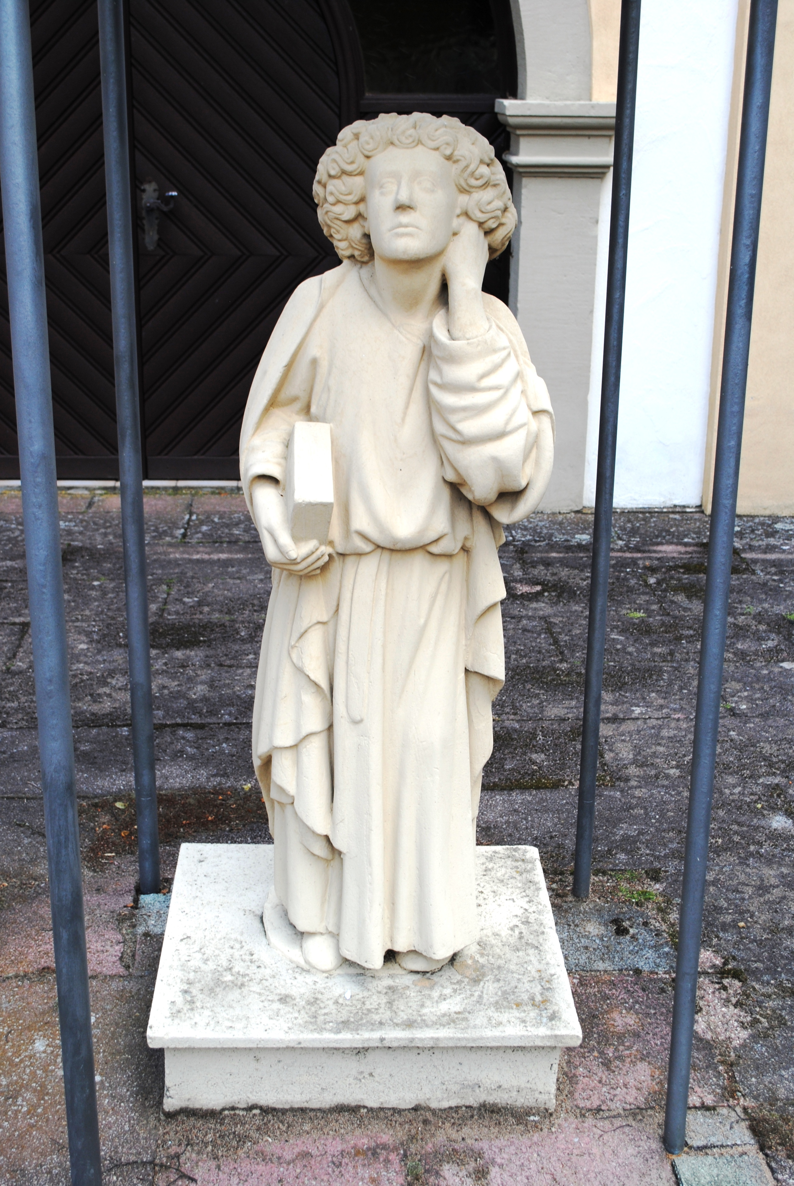 Johannesfigur, Kreuzigungsgruppe, Fahr